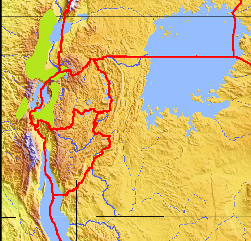 Verbreitungsgebiet der Goldmeerkatze